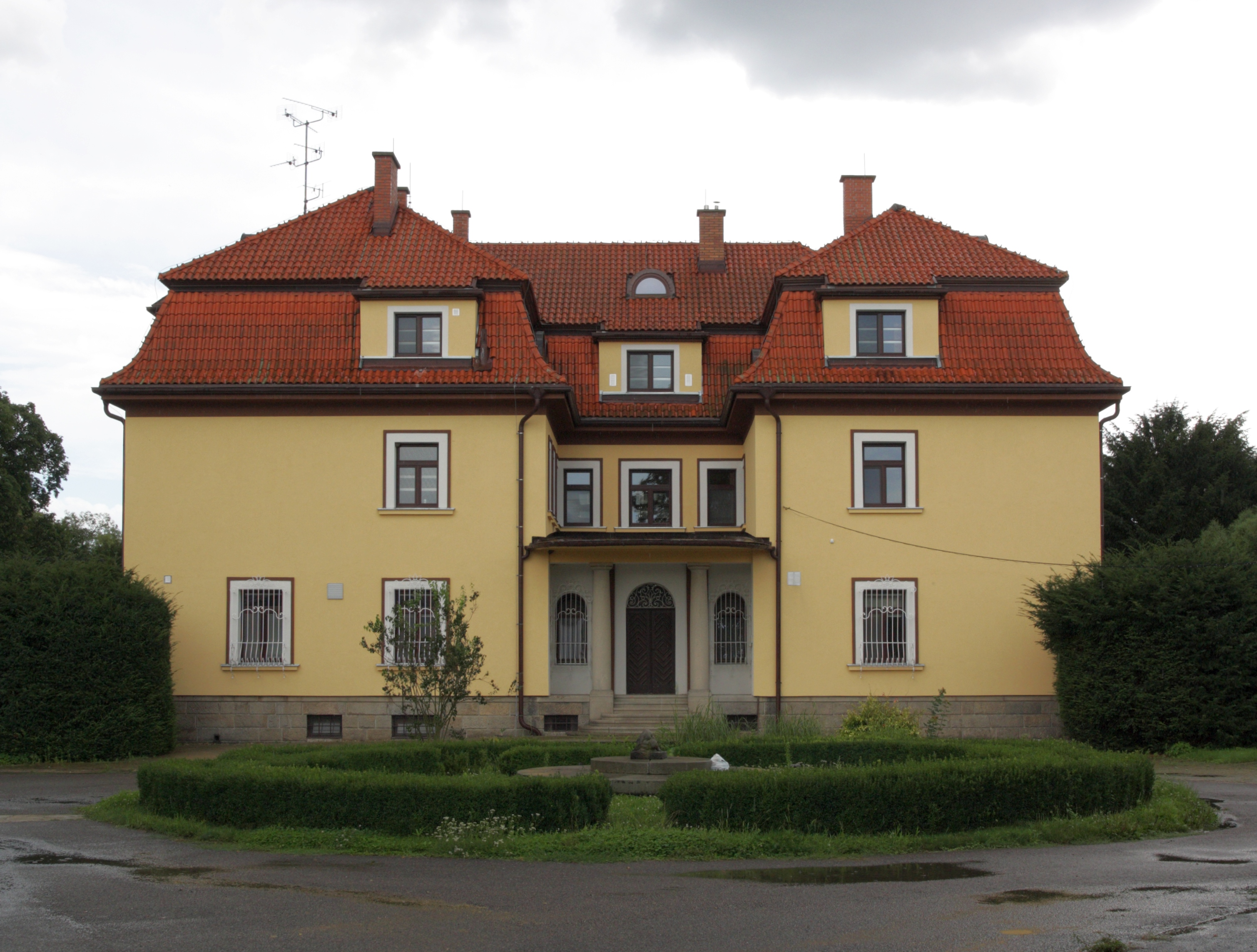 Cvrčovice (okres Brno-venkov) - zámek, hlavní průčelí.